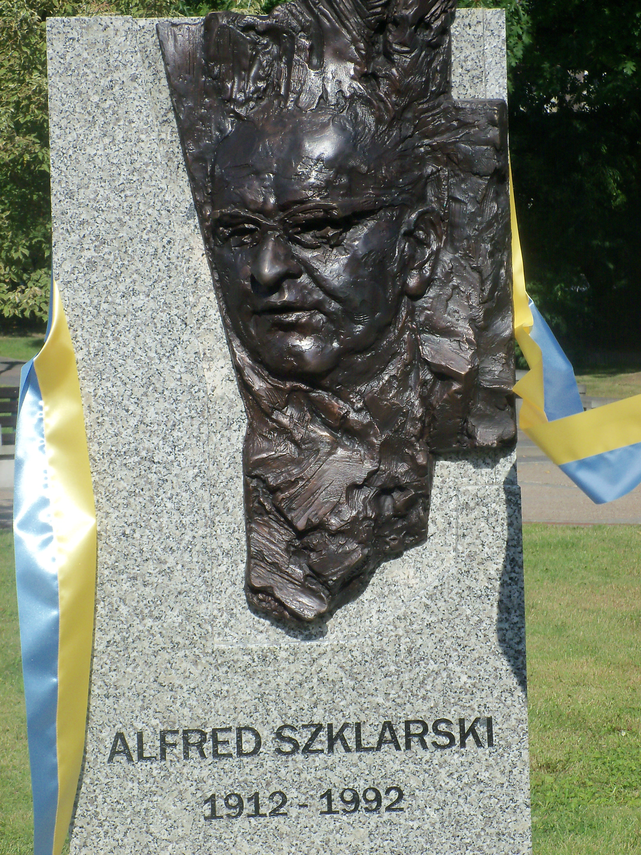 Tablica pamiątkowa, przedstawiająca pisarza Alfreda Szklarskiego, odsłonięta 9 września 2011 na placu Grunwaldzkim w Katowicach, w Galerii Artystycznej.